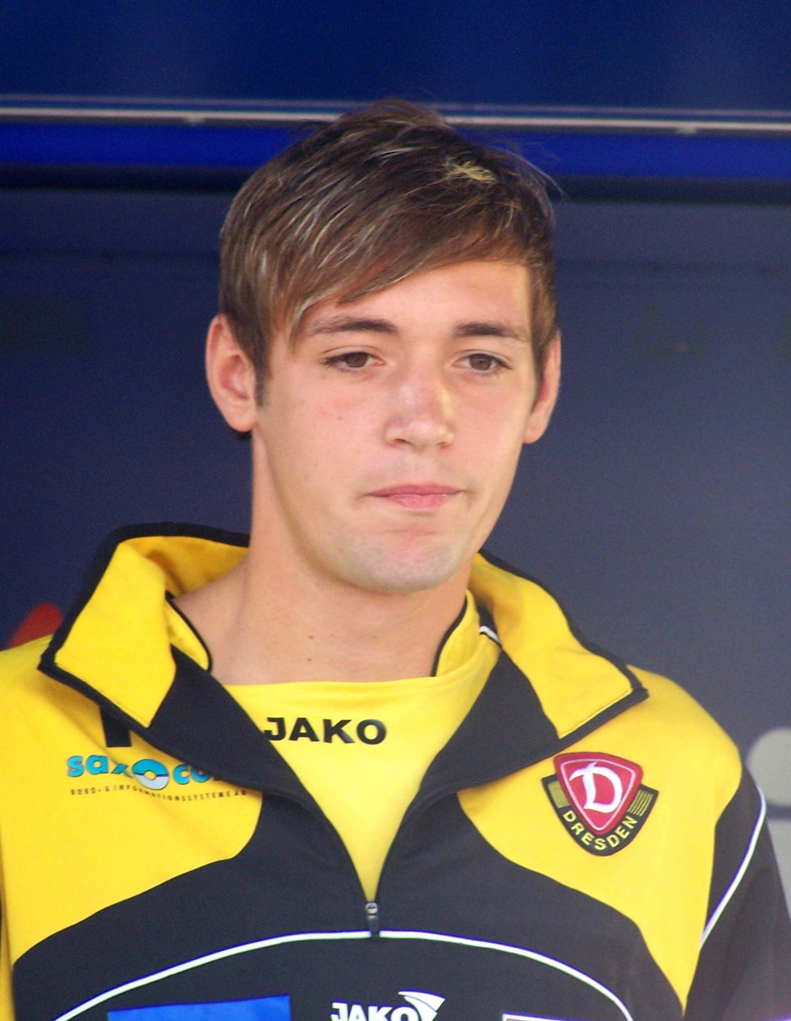 Maik Kegel bei der Teampräsentation von Dynamo Dresden zum Start der Drittliga-Saison 2008/09